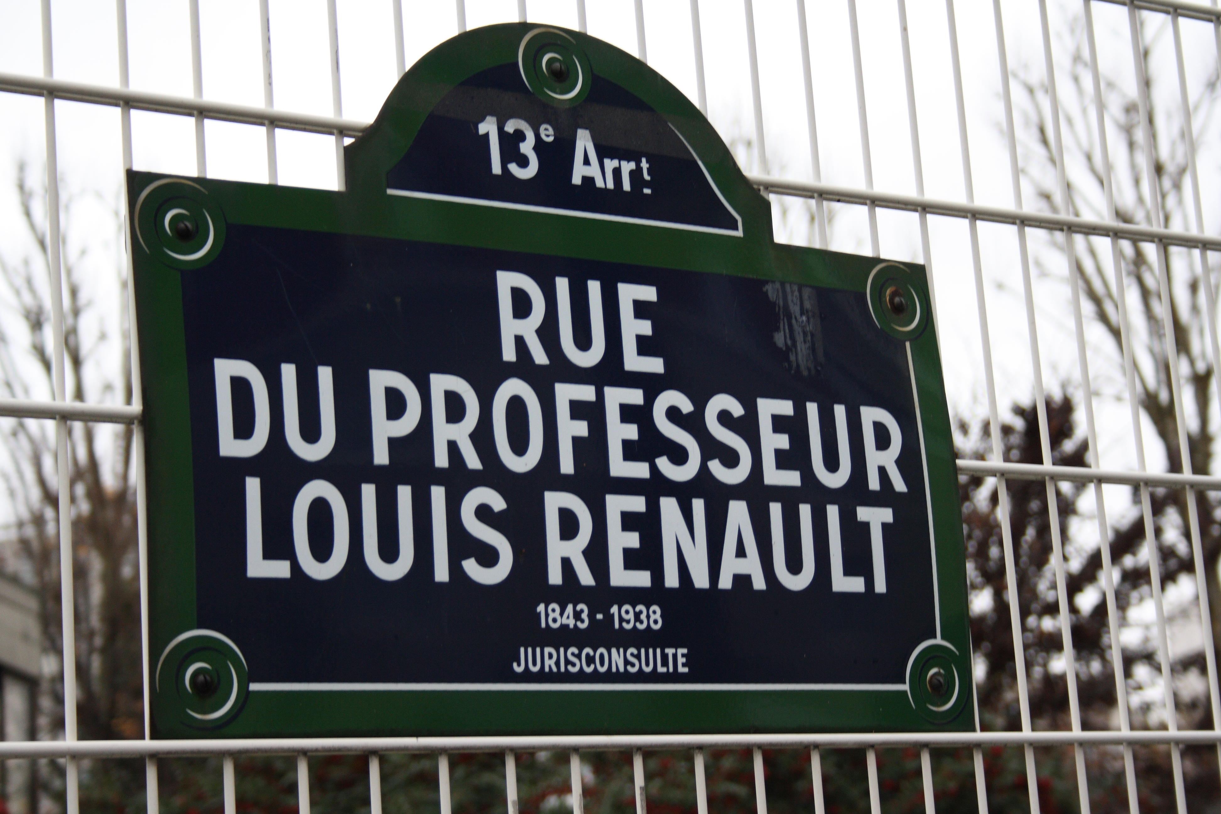 Straßenschild Rue du Professeur-Louis-Renault in Paris (13. Arrondissement)